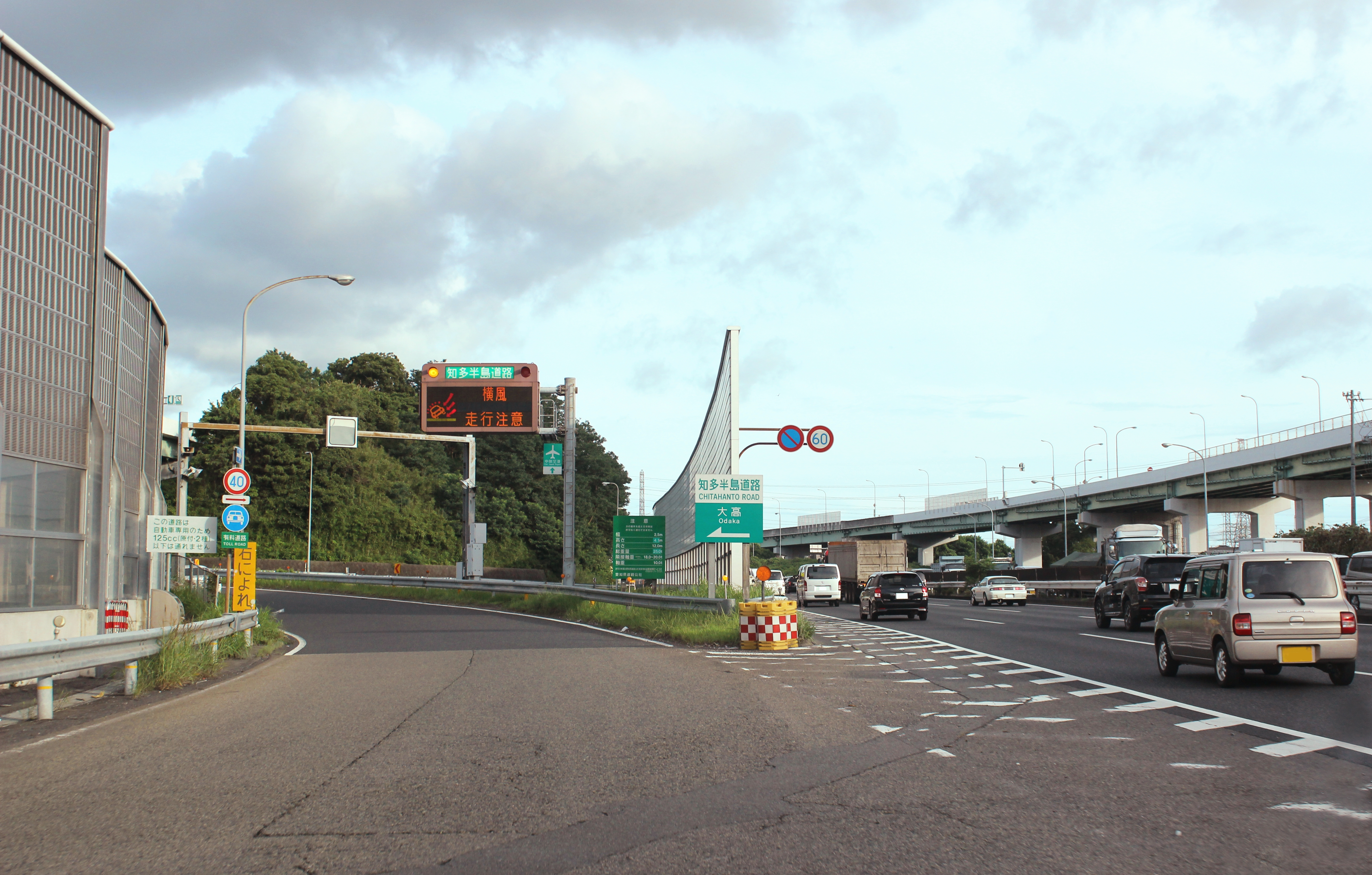 知多半島道路 大高IC入口